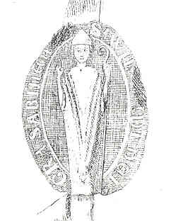 En avritning från 1800-talet av Vilhelm av Sabinas sigill på Skänninge Mötes dokument av den 1 mars 1248.